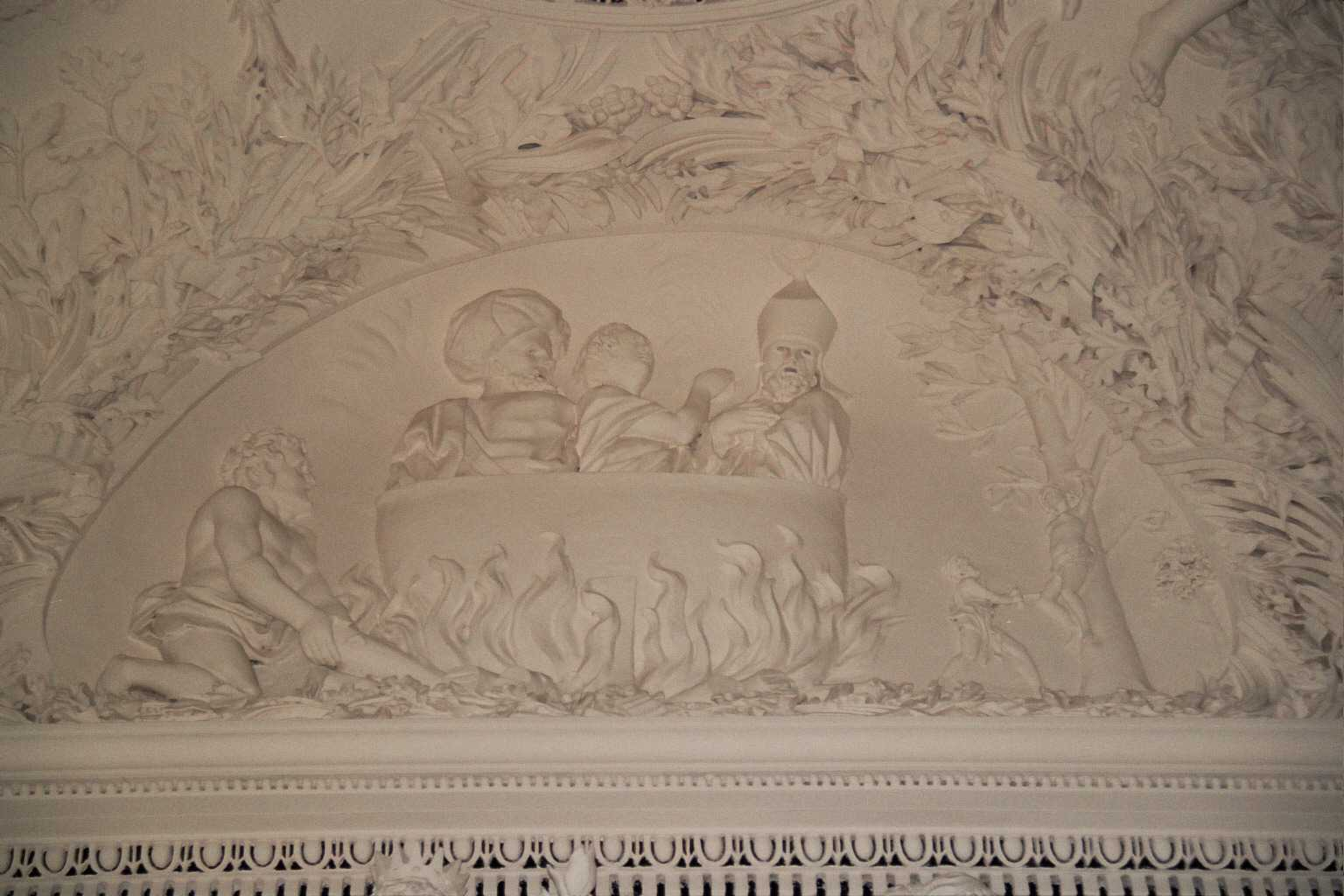 Reliefo de katolika preĝejo en Vilno, Litovio